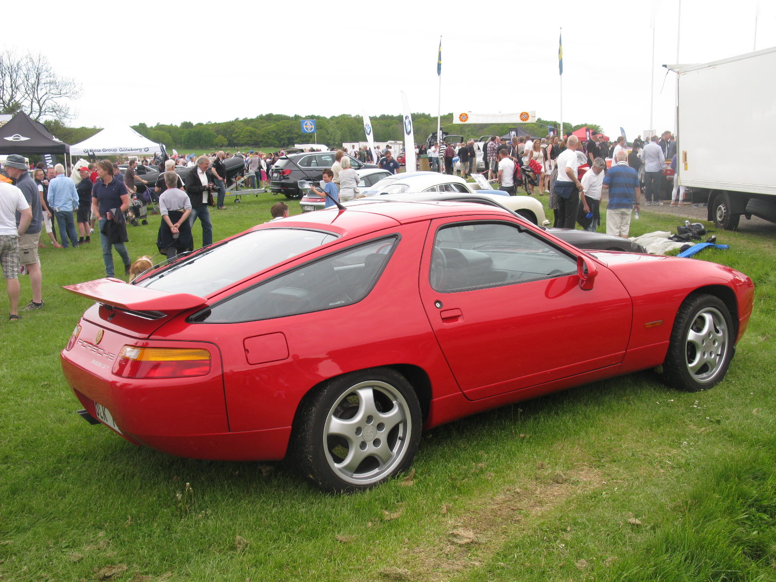 Porsche 928 GT